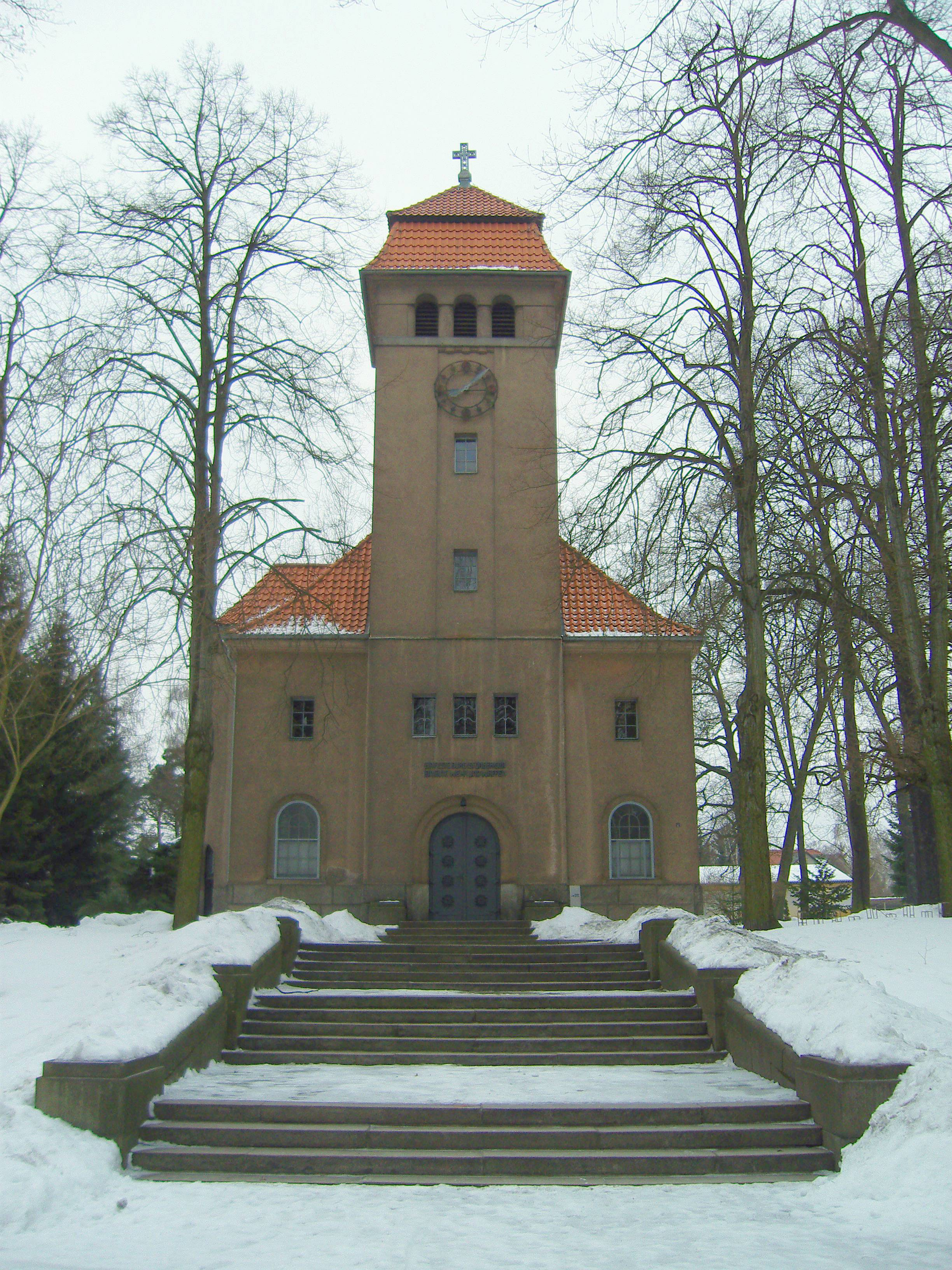 Friedensgedächtniskirche in Lauchhammer; Baudenkmal, 1996 profaniert